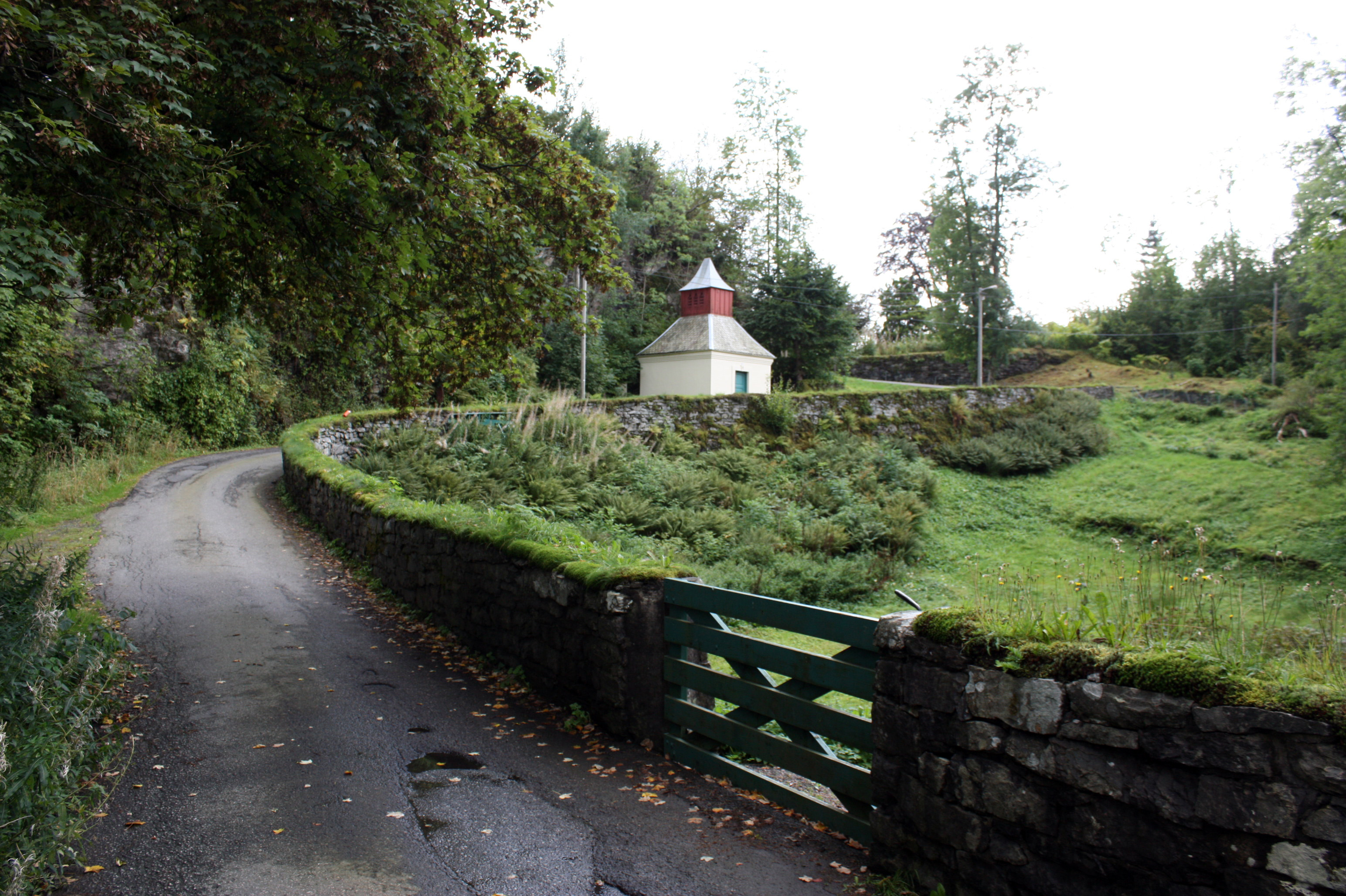 Hopsnesvegen, Fana, Bergen.